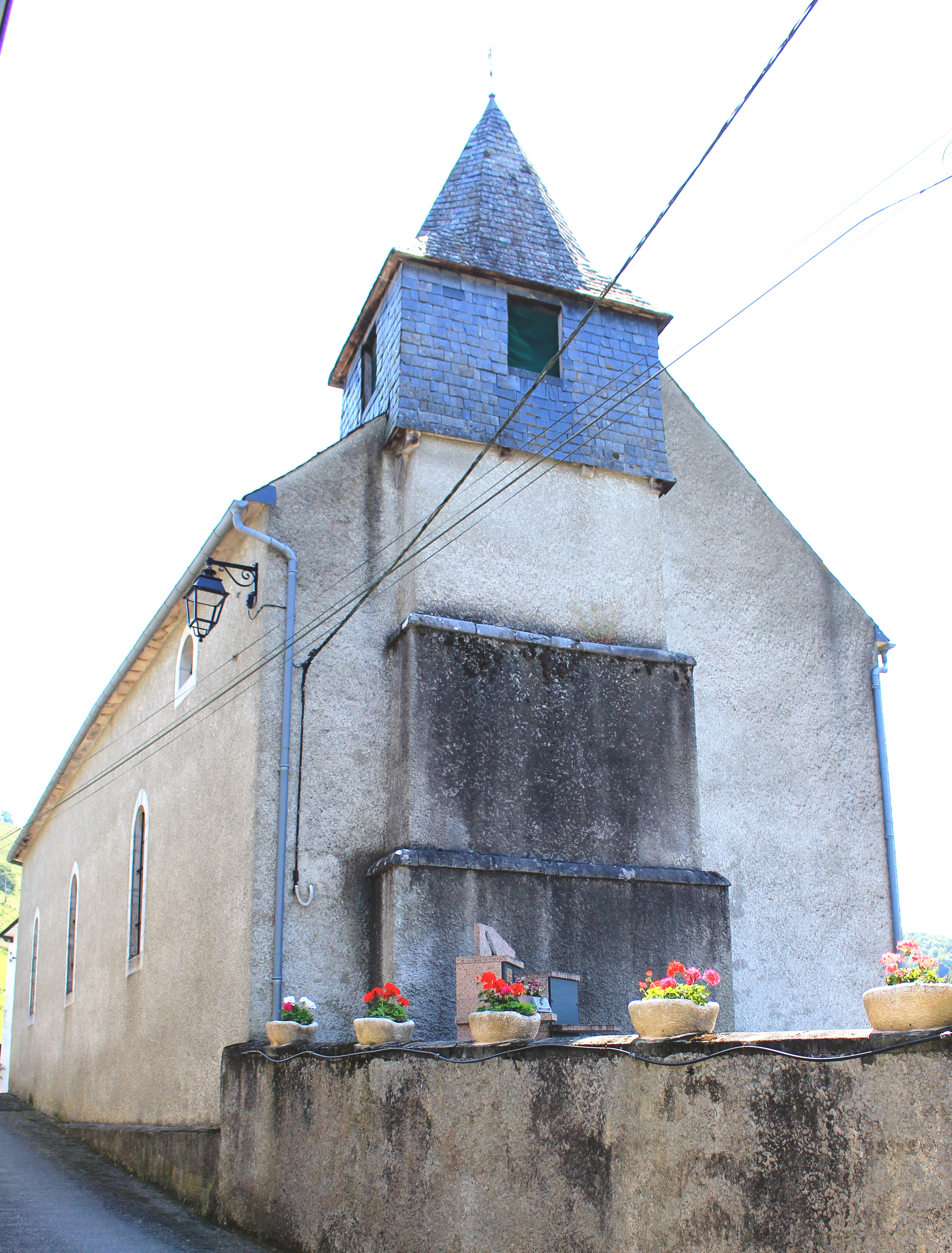 Église Saint-André d'Espèche (Hautes-Pyrénées)